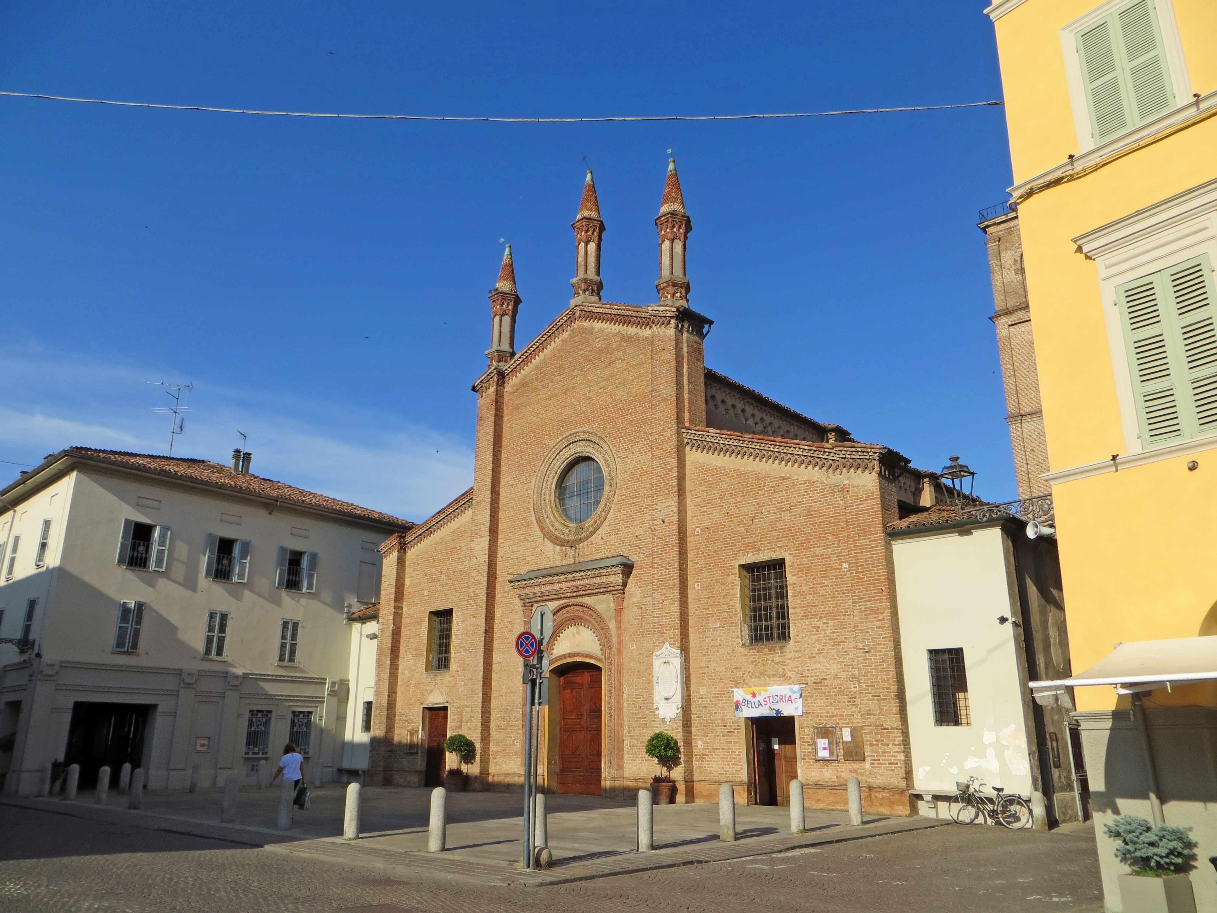 Collegiata di San Bartolomeo Apostolo (Busseto) - facciata